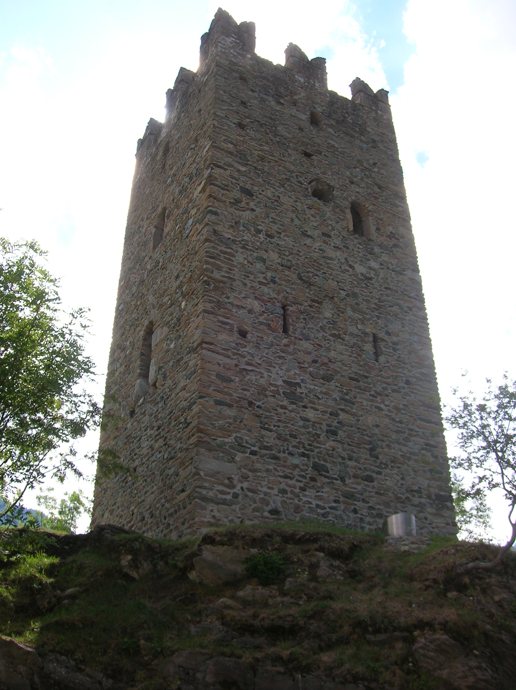 Castello di Champorcher, Champorcher, Valle d'Aosta, Italia.